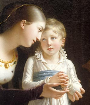 Peinture (detail)